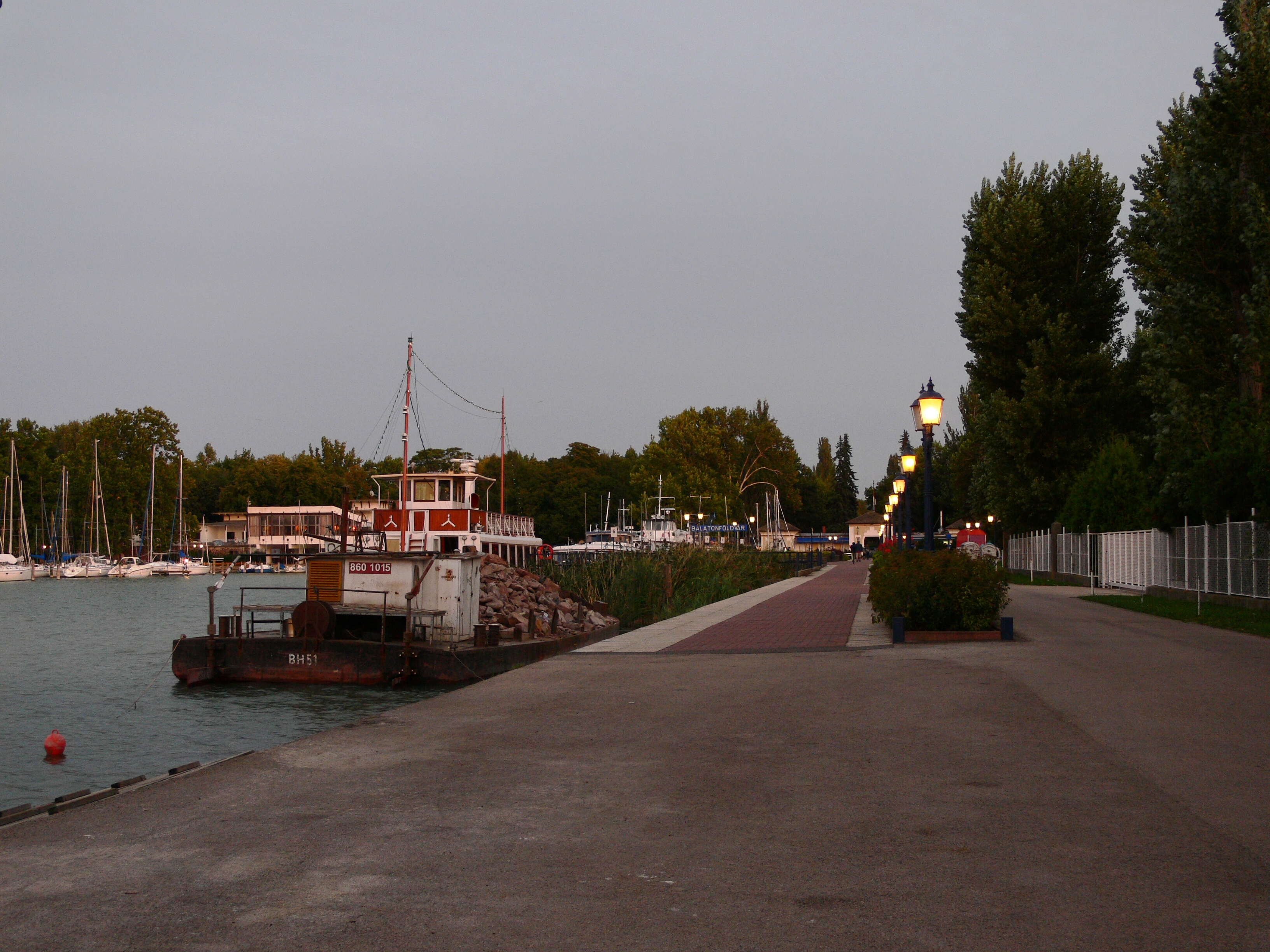 A balatonföldvári móló.